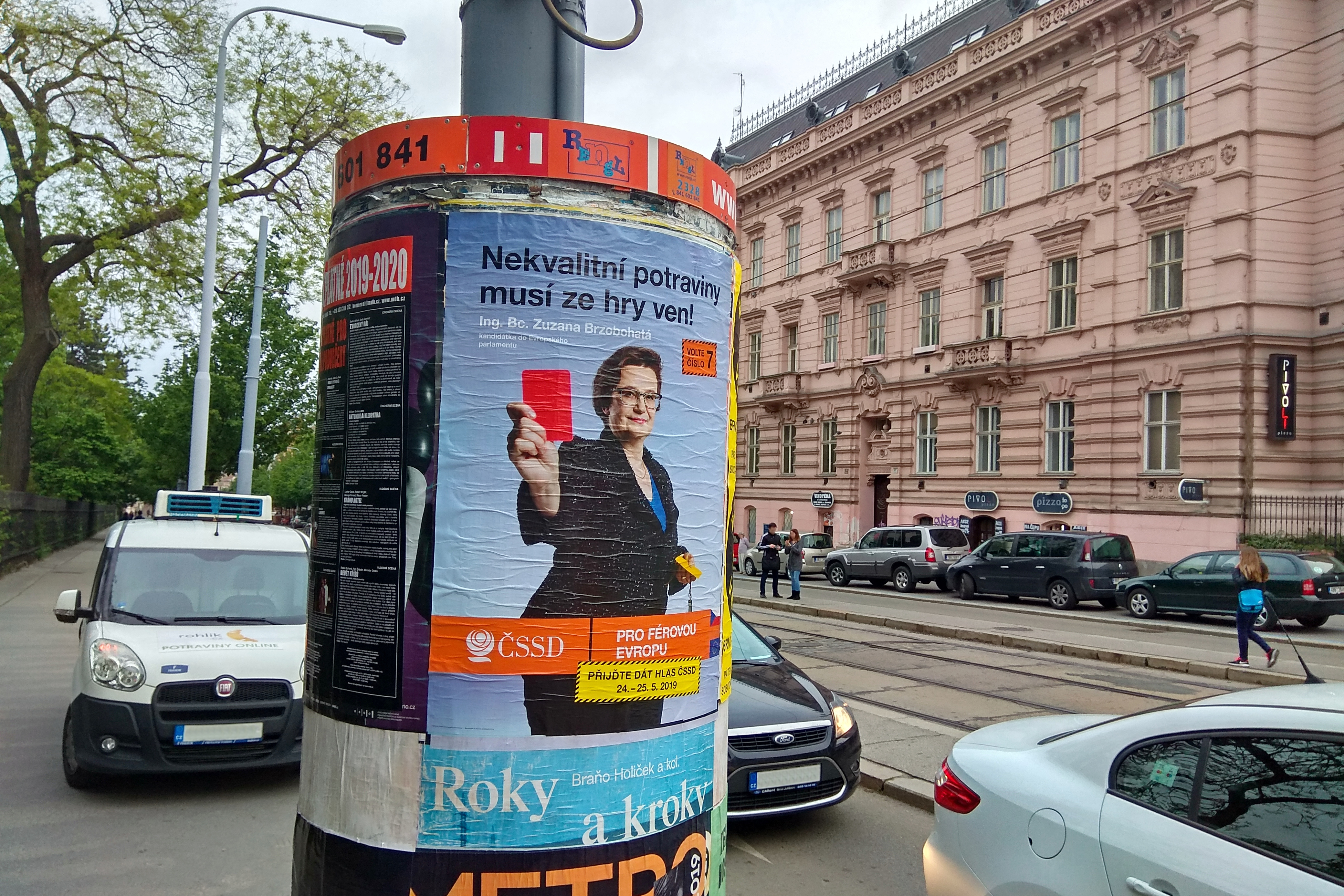 Předvolební plakát České strany sociálně demokratické (ČSSD) 14. května 2019 před volbami do Evropského parlamentu. Umístěný na výlepové ploše Rengl poblíž zastávky MHD Konečného náměstí na Veveří ulici v Brně.